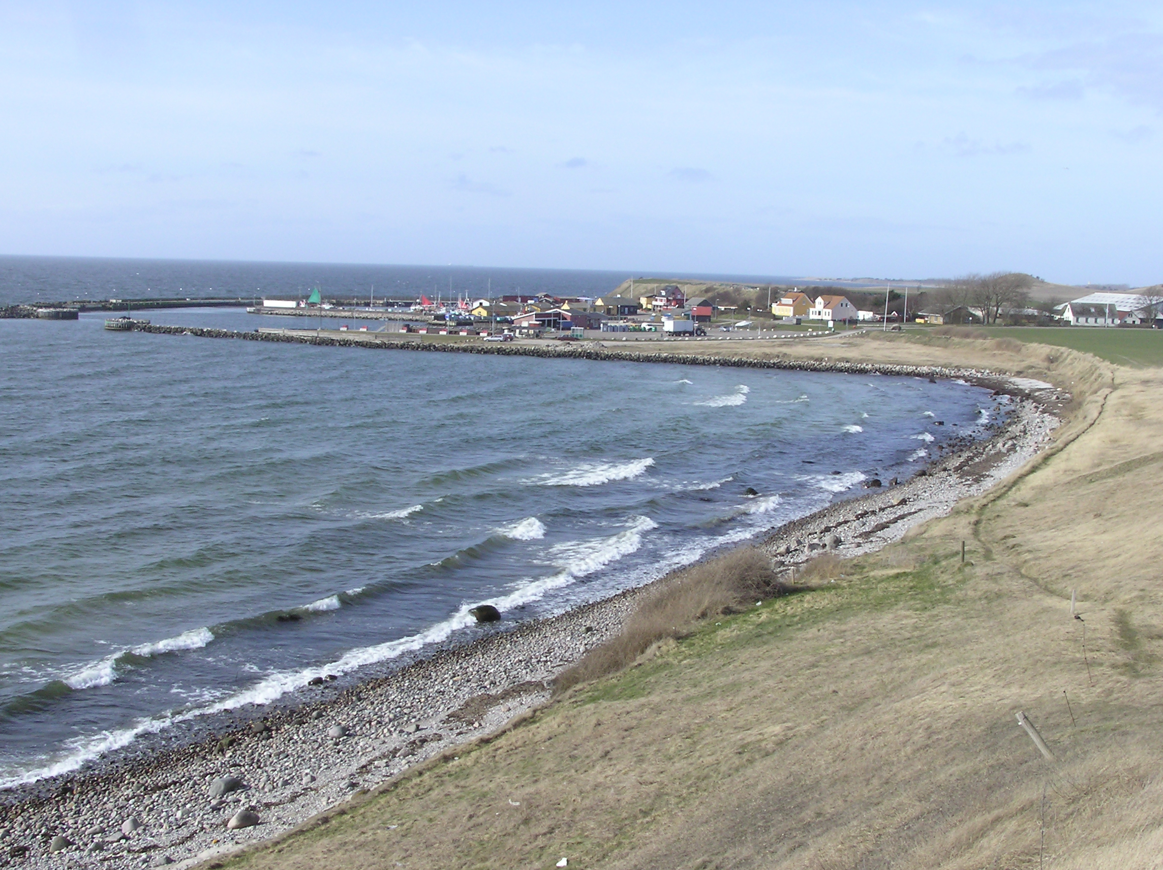 Danmark Sjælland Seierø Hafen